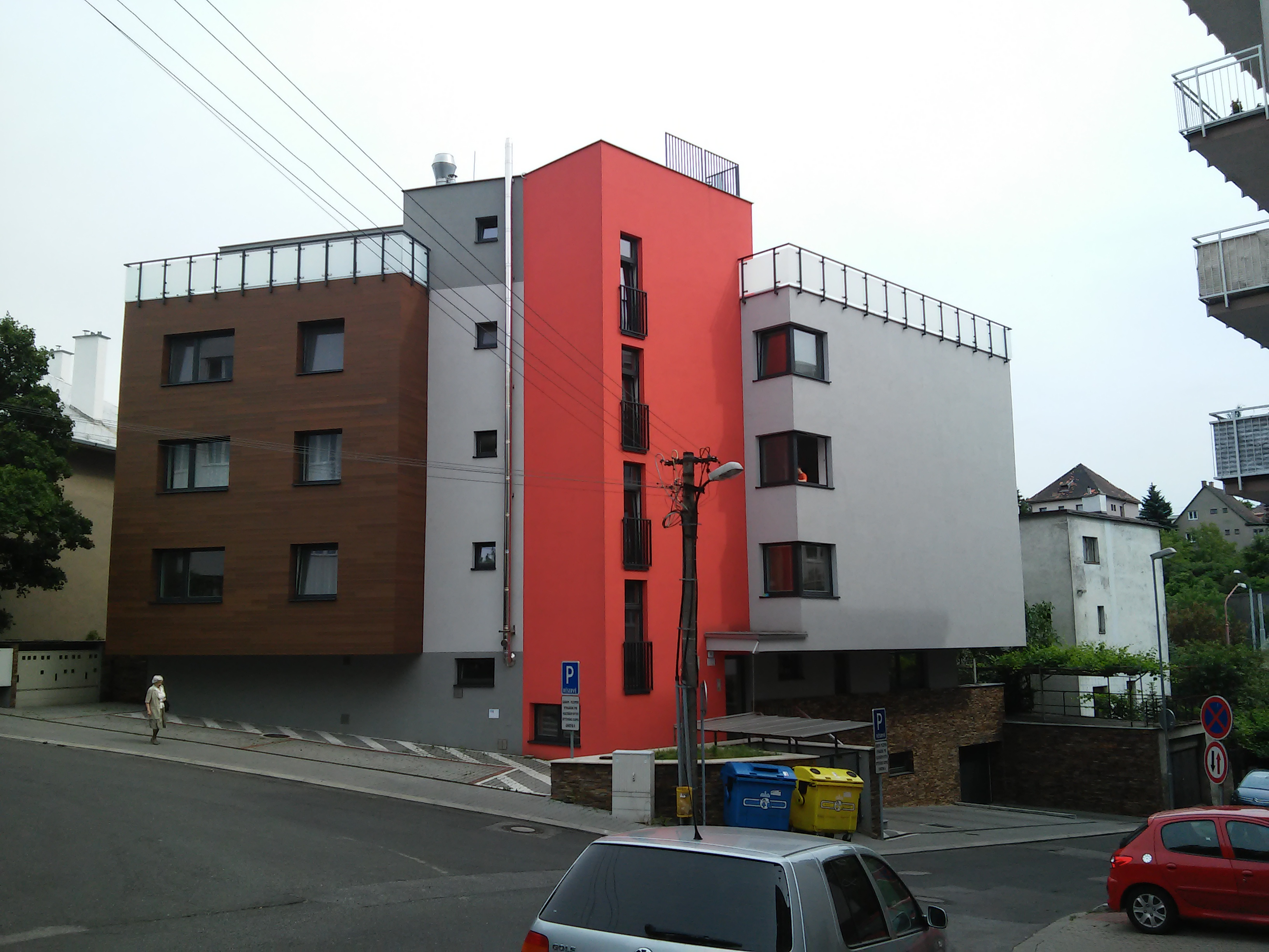 Vila Jaroň, Uhrova 4, Nové Mesto, Bratislava